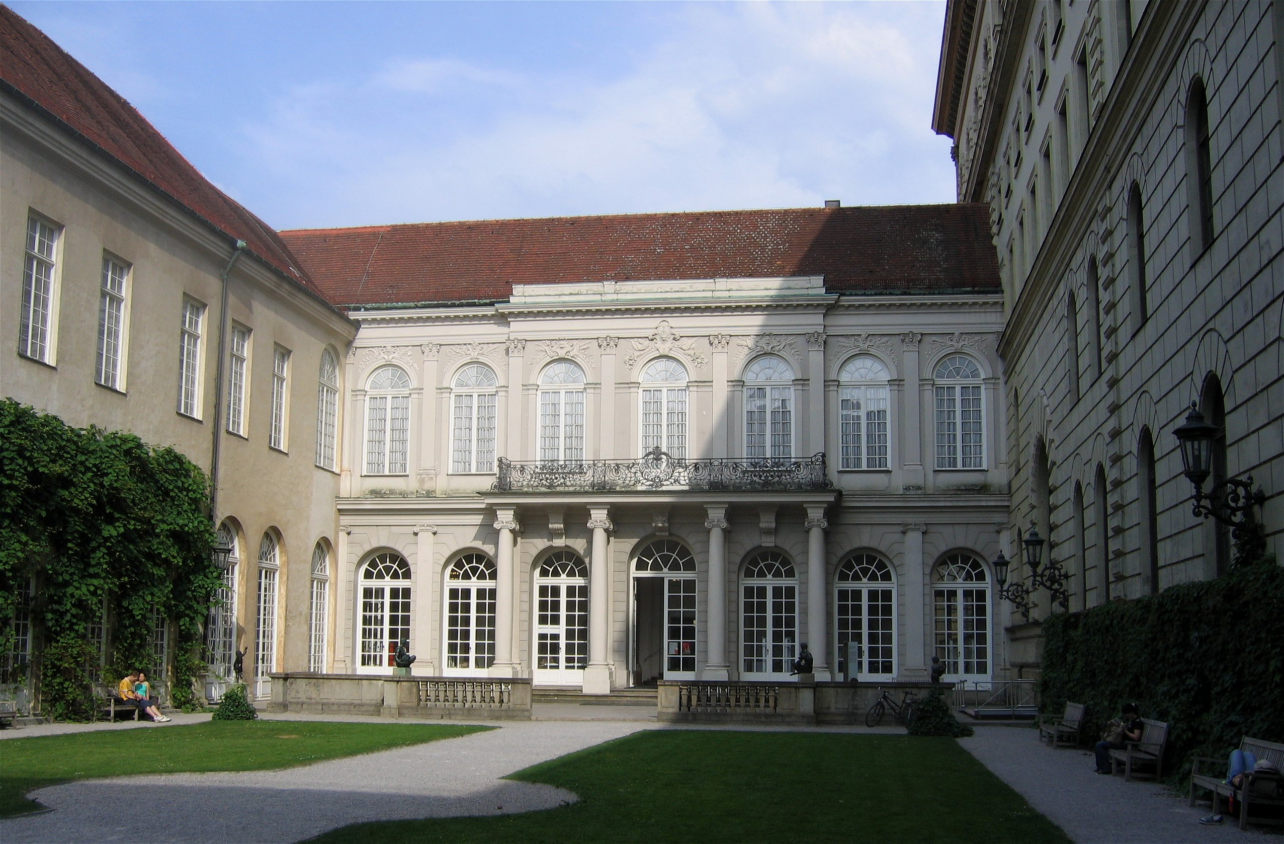 Königsbauhof der Residenz, München